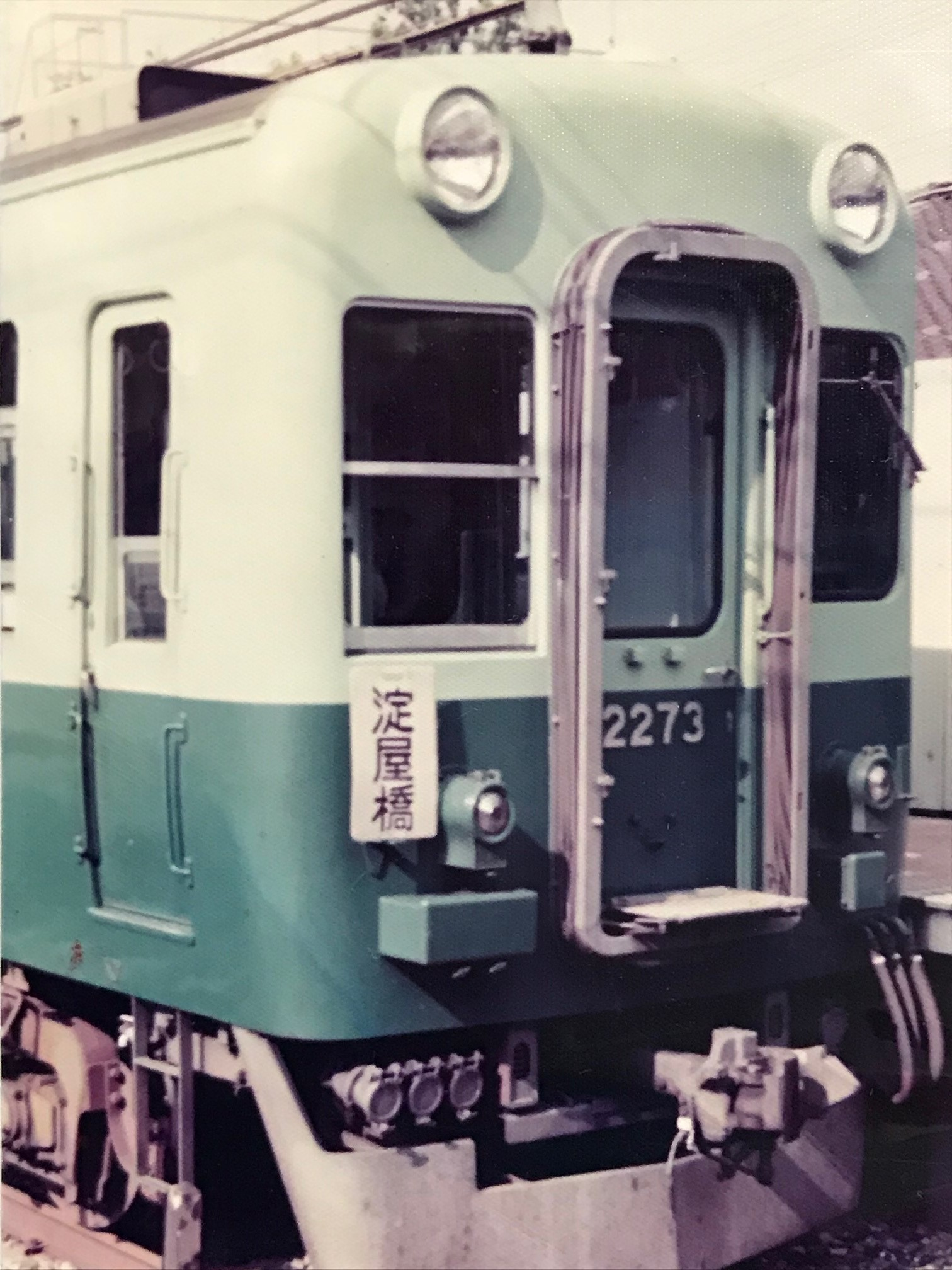 京阪2200系原型